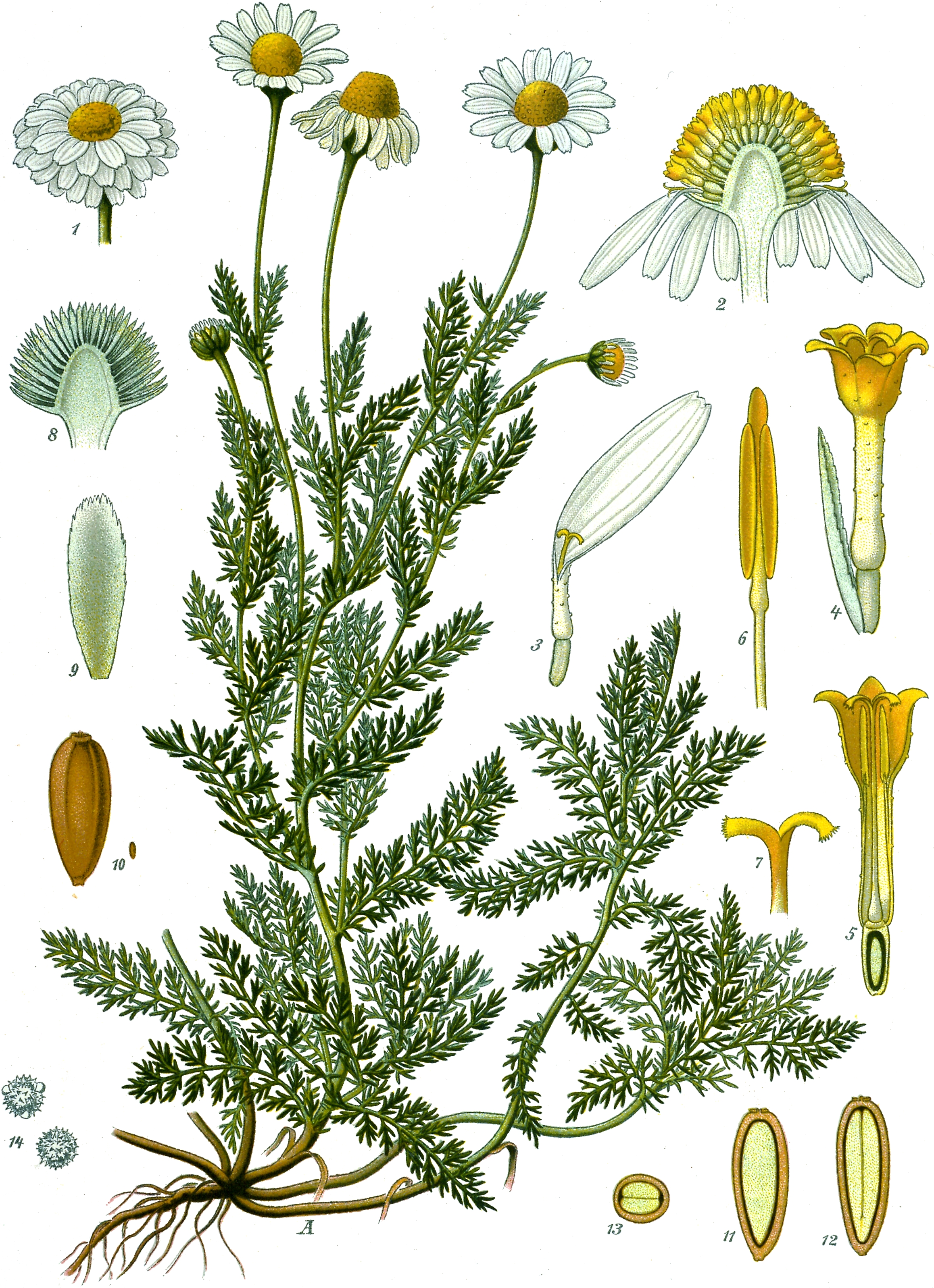 Römische Kamille. A blühende Pflanze. 1 gefülltes Körbchen; 2 Körbchen im Längsschnitt; 3 Randblüte; 4 Scheibenblüte mit Stützblatt; 5 dieselbe im Längsschnitt; 6 Staubblatt; 7 Narbe; 8 Blütenboden mit Spreublättern im Längsschnitt; 9 Spreublättchen, Vorderansicht; 10 Früchtchen natürlicher Grösse und vergrössert; 11 und 12 Längsschnitte desselben; 13 Querschnitt desselben; 14 Pollen.